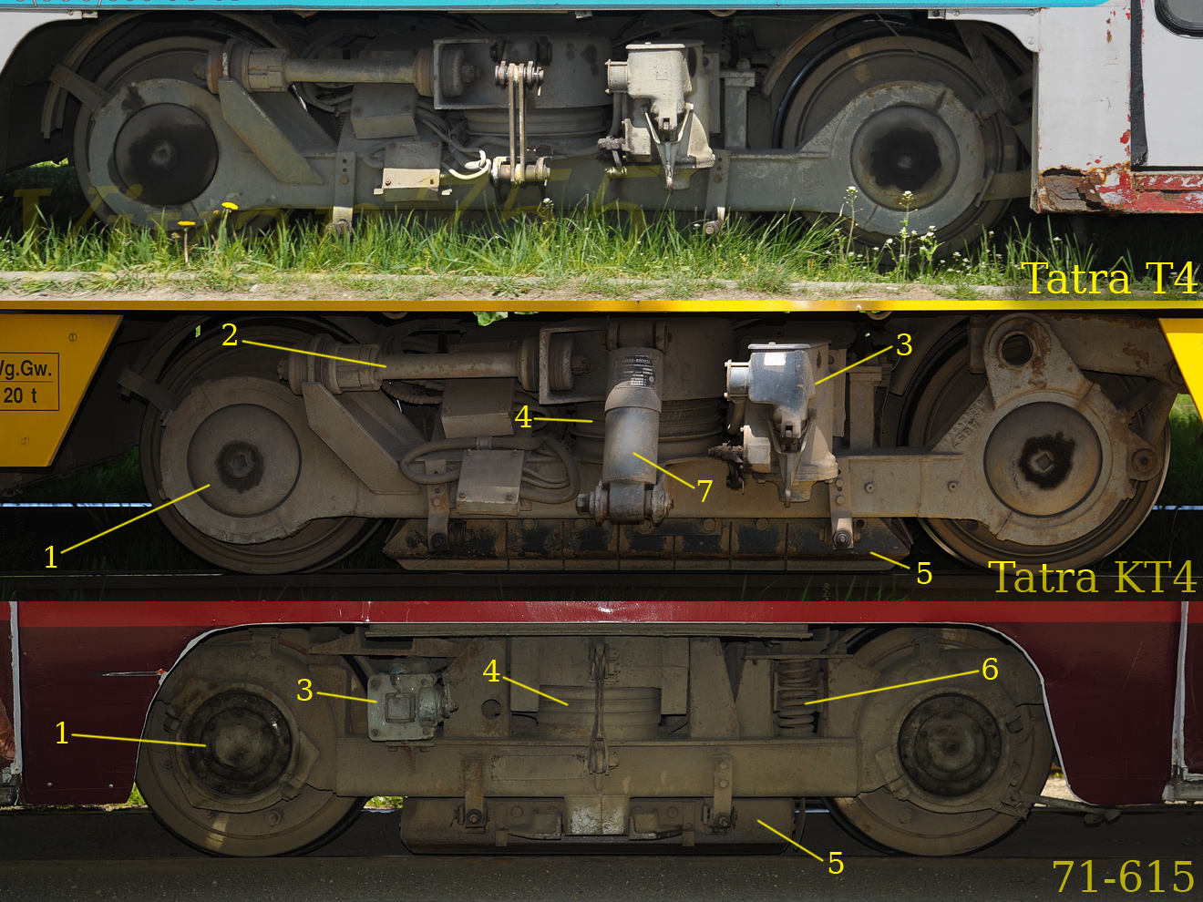 Тележки трамвайных вагонов Tatra T4, Tatra KT4 и 71-615. 1 — букса, 2 — поводок, 3 — соленоид колодочного тормоза, 4 — резинометаллическая рессора, 5 — башмак магниторельсового тормоза, 6 — подвеска башмака, 7 — гидрогаситель